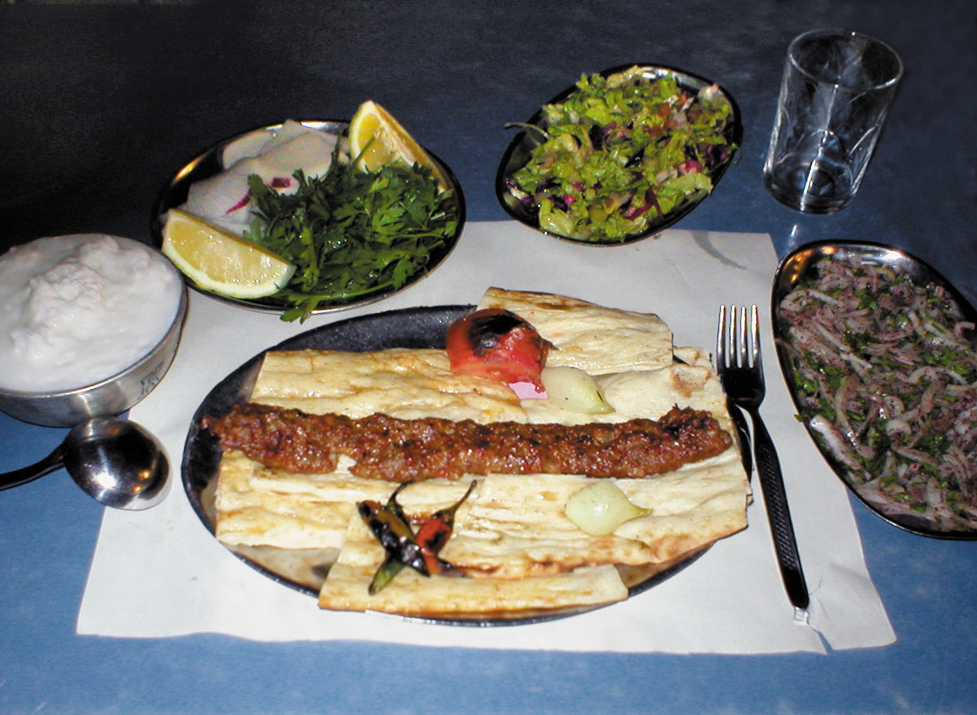 Selbst fotografiert. Lizenz GNU.